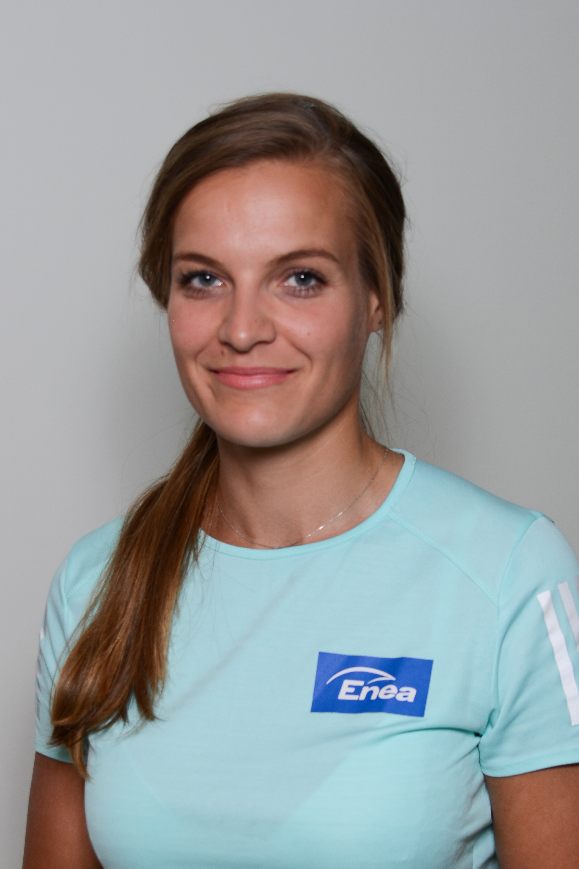 Polska wioślarka Monika Chabel (z domu Ciaciuch) - 2018